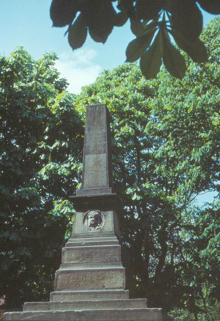 Pomnik Teofila Wiśniowskiego i Józefa Kapuścińskiego na Górze Stracenia we Lwowie Fotografia wykonana w 1974 roku. Autor: Stanisław Kosiedowski.